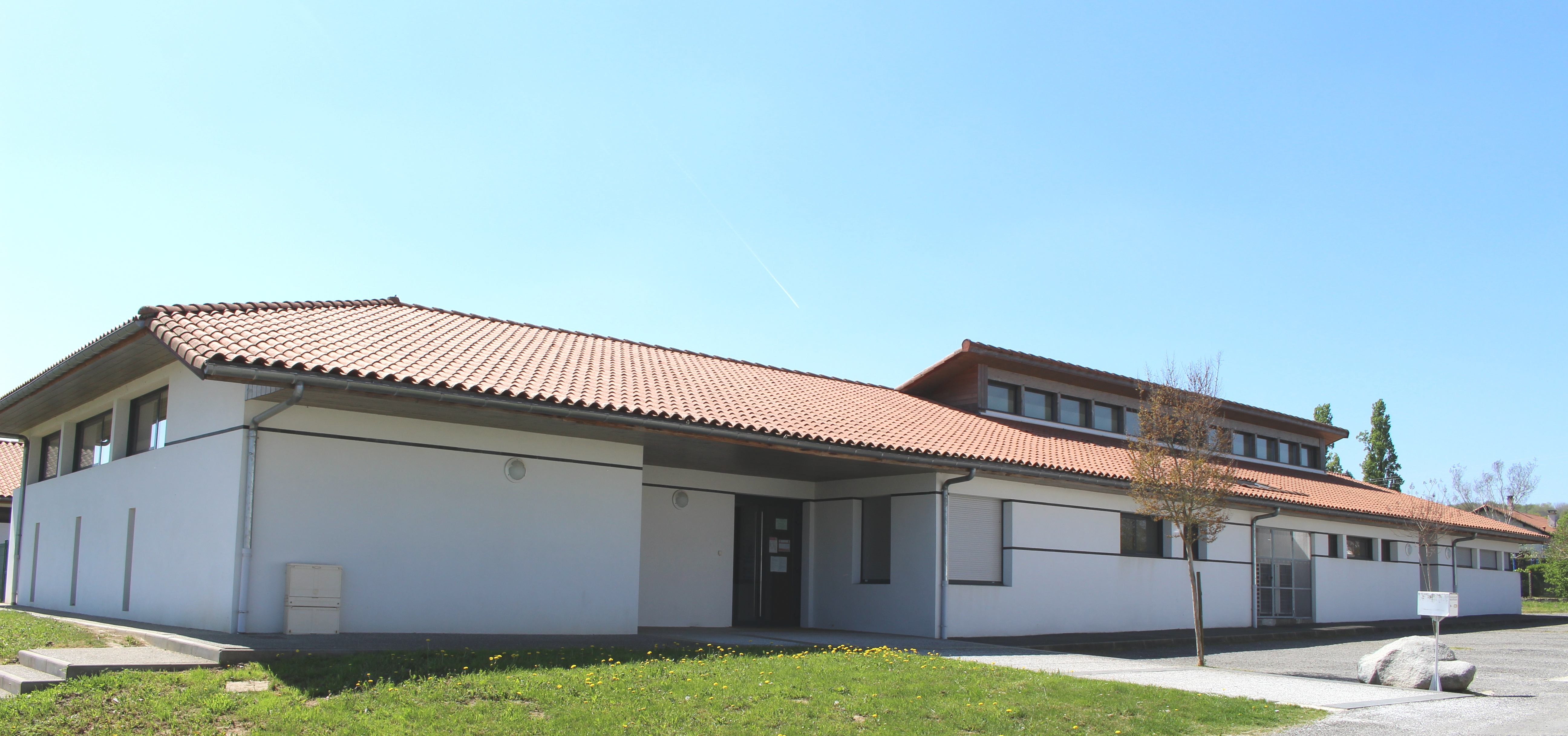 École de Mascaras (Hautes-Pyrénées)